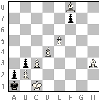 Les blancs jouent et gagnent. Une étude d'échecs anonyme. Image faite par User:Mlavaud avec MS Paint.